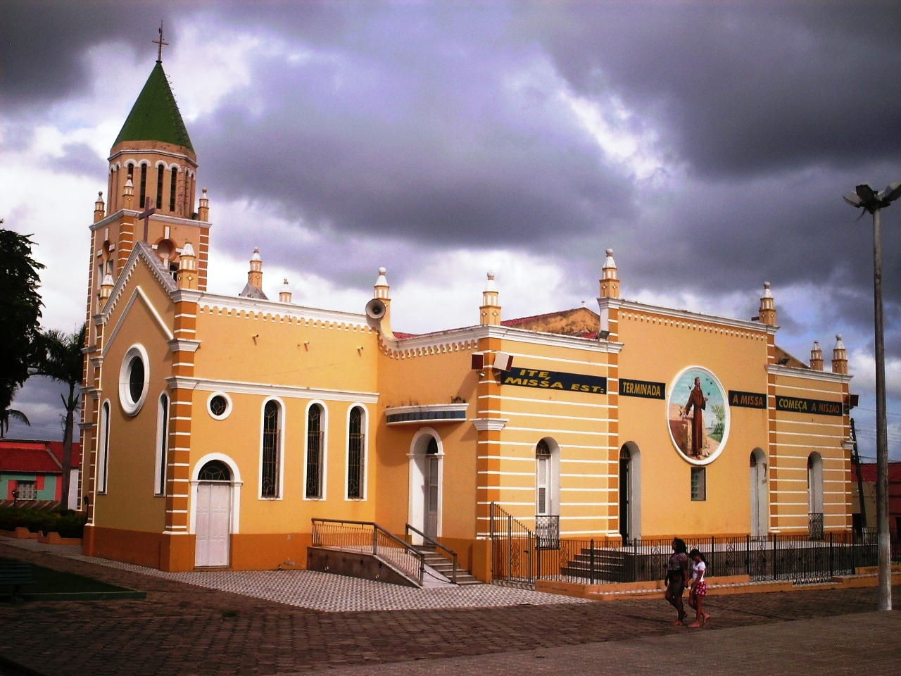 Igreja Matriz de Cruz, Ceará, Brasil.